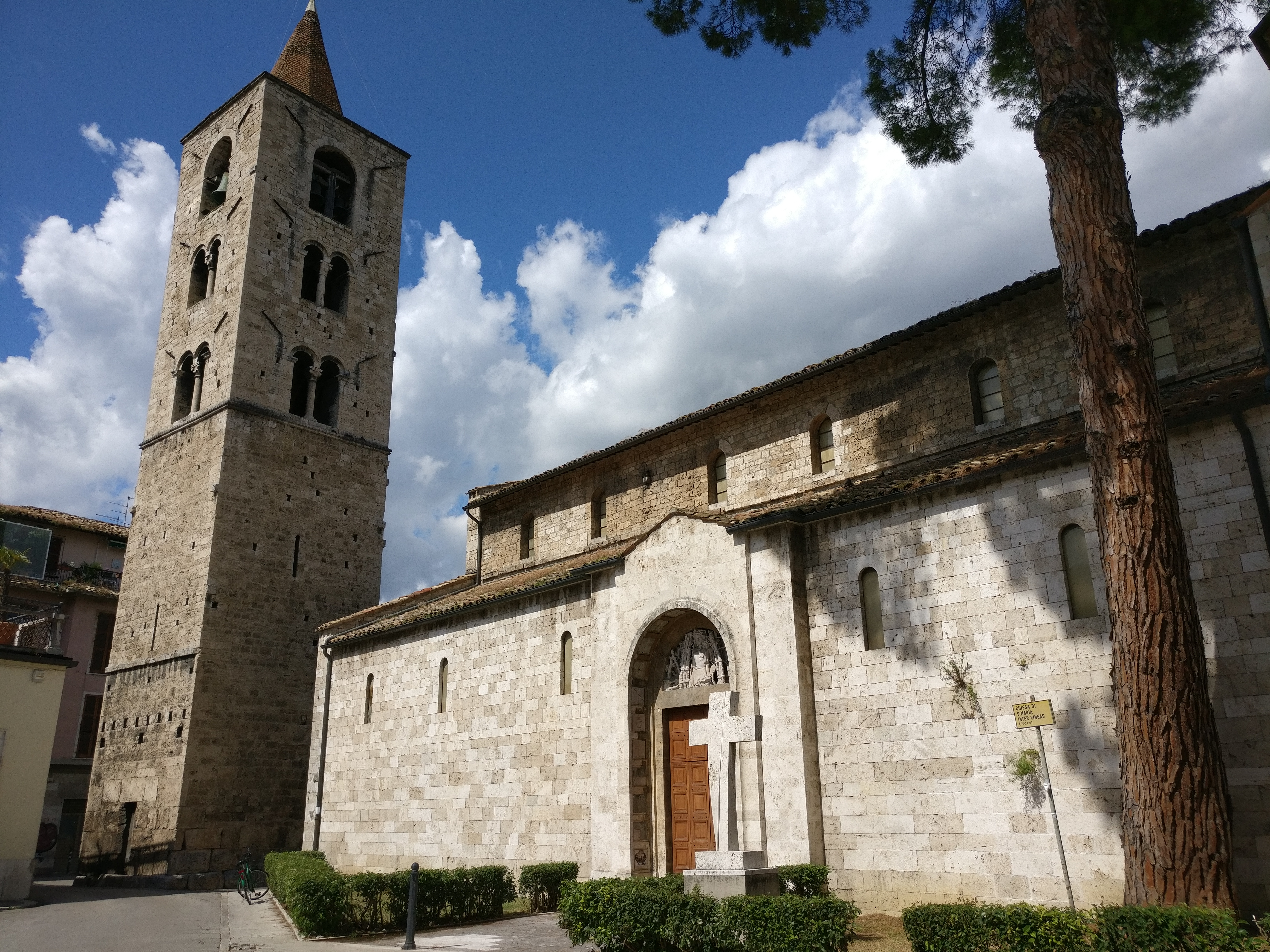 chiesa di Santa Maria Assunta